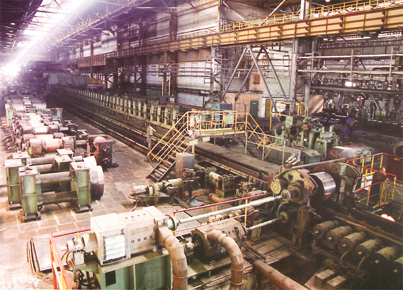 Цех горячей прокатки полос и листов